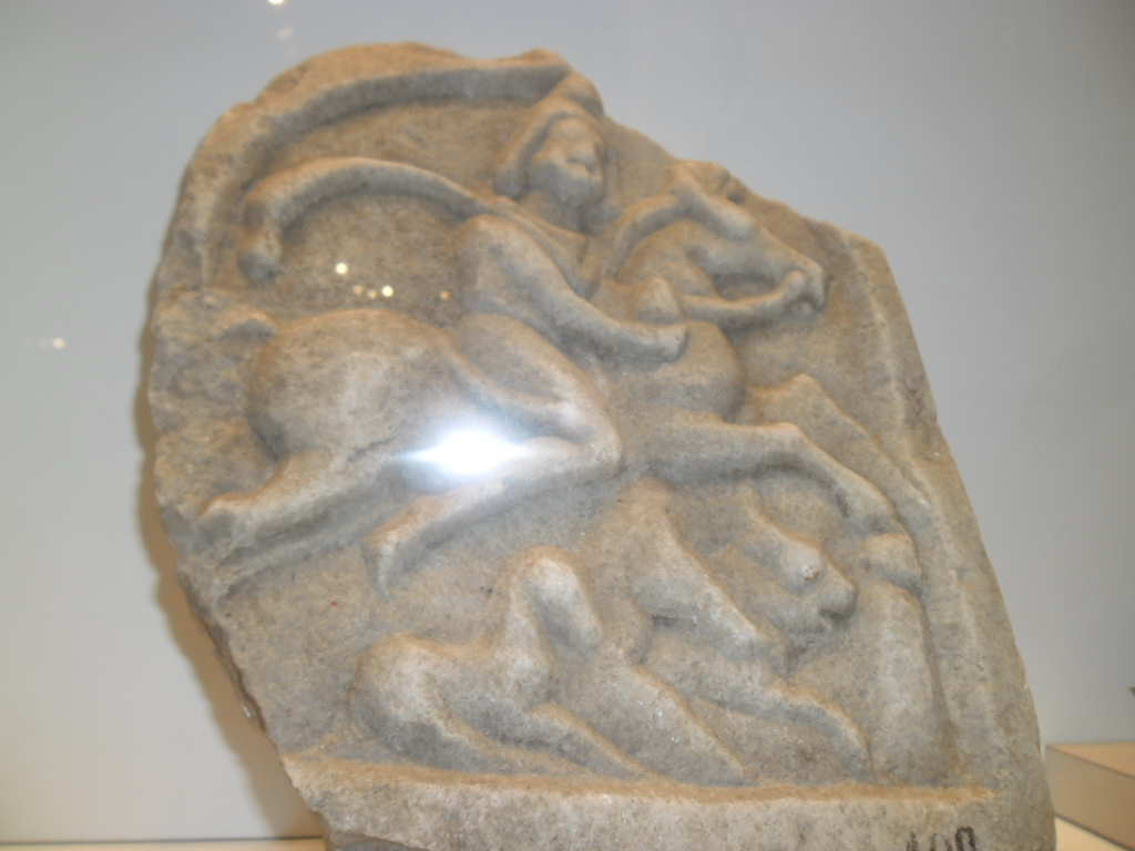 Arheološki muzej u Zagrebu